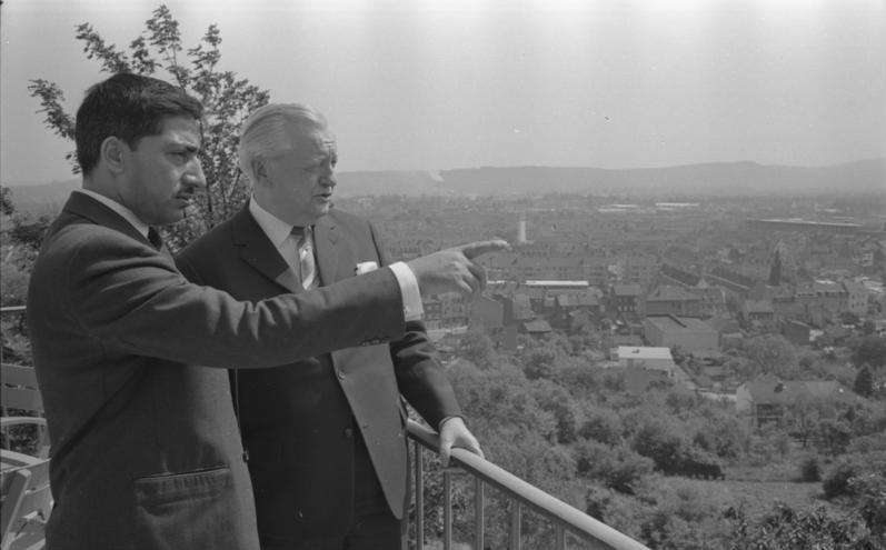 Sts. Prof. Bülow empfängt den kgl.-afghan. [königlich-afghanischen] Staatssekretär im BM Justiz Kamawi